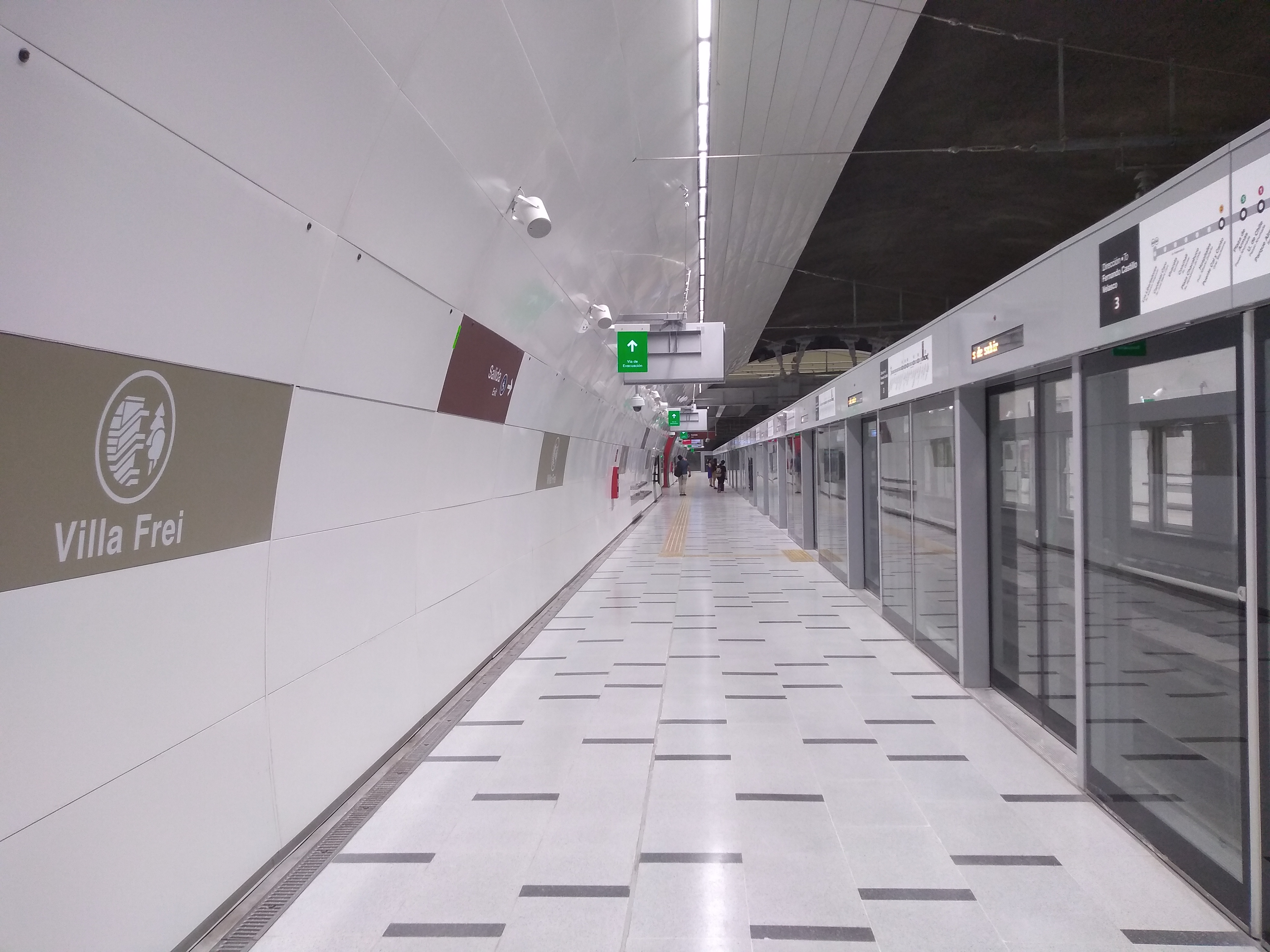 Estación Villa Frei